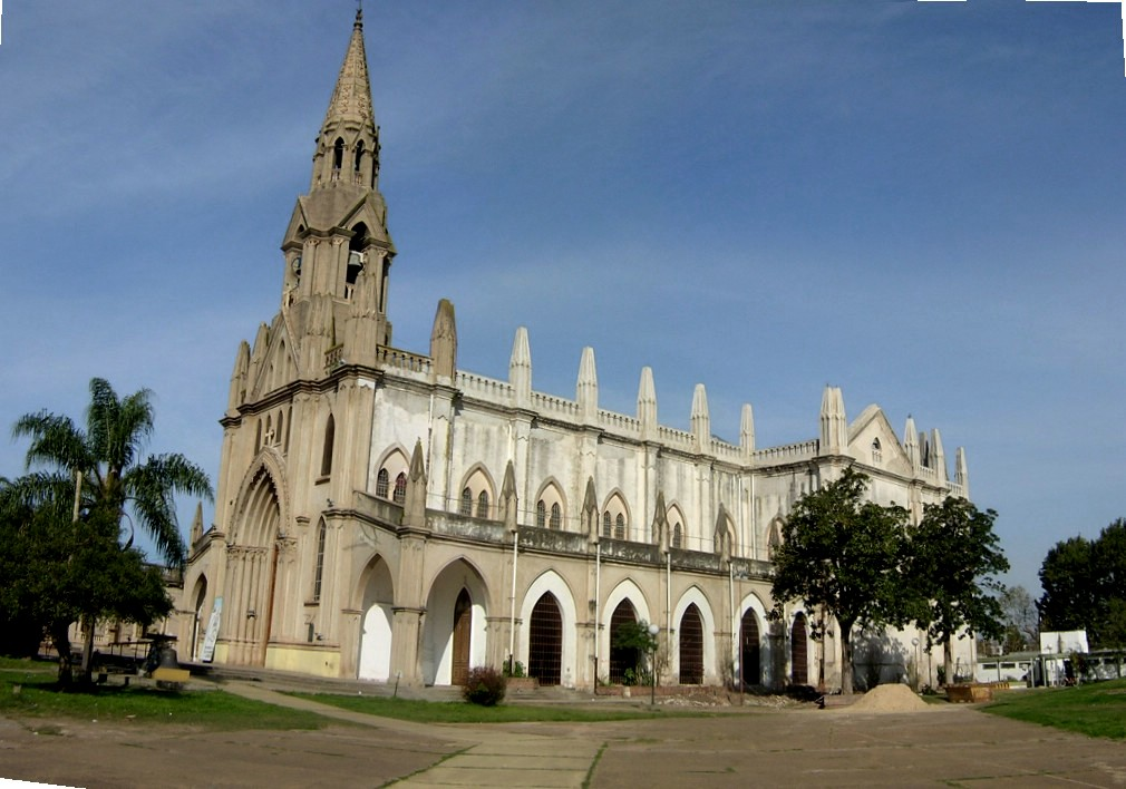 Vista lateral de la Basílica de Guadalupe, en la ciudad de Santa Fe, Argentina. Foto tomada durante el año 2006, con una cámara Nikon digital, en partes. Luego se armó esta imagen con un software de composición